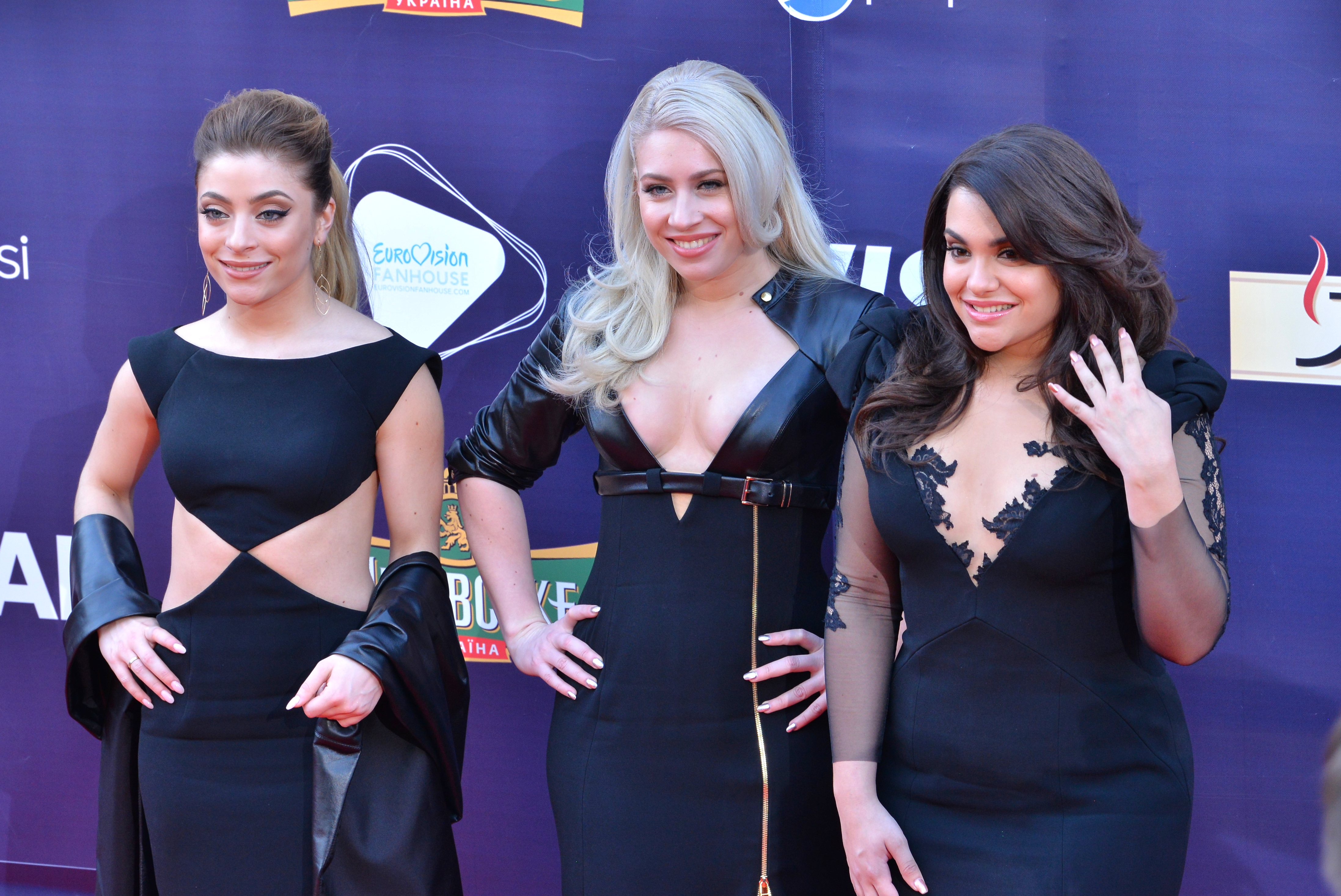 Група O'G3NE з Нідерландів на церемонії відкриття пісенного конкурсу Євробачення 2017 у Києві